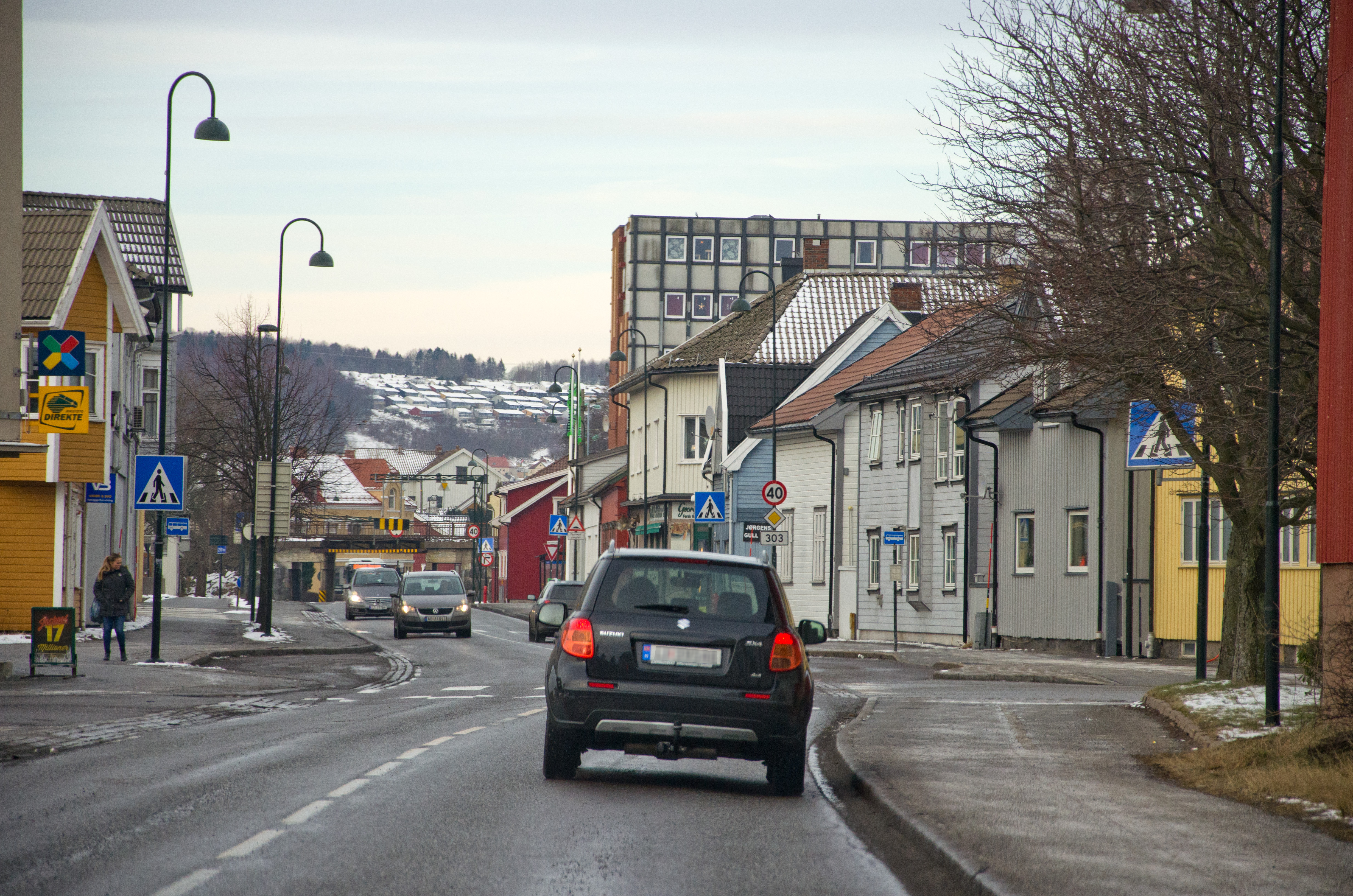 Vestfolds fylkesvei 303, Dronningens gate i Larvik